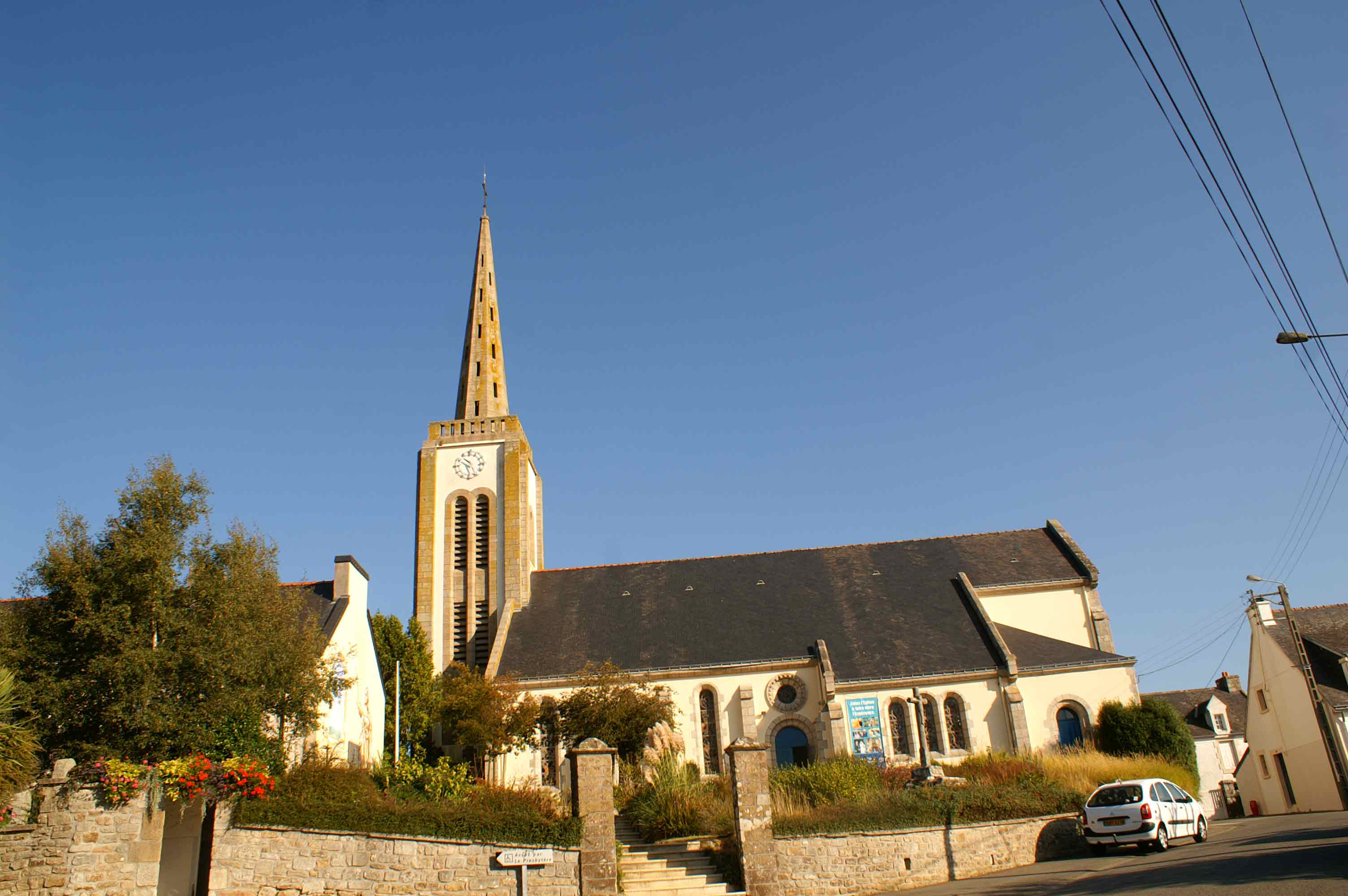 Église Notre-Dame-des-Fleurs de Gestel. Détruite en 1945 elle est reconstruite en 1959.